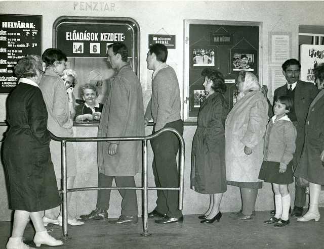 Jegyvásárlás az előadásra az 1960-as évek elején a József Attila Kultúrházban (Magyarország, 1131 Budapest, József Attila tér 4.)